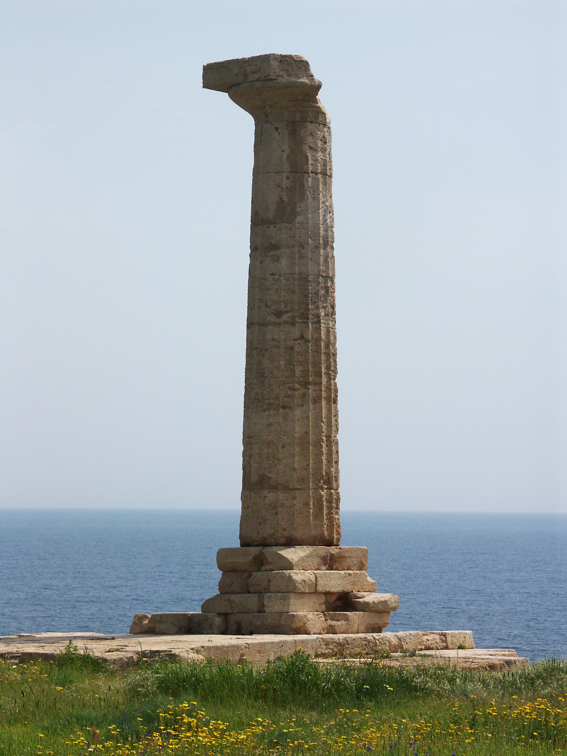 Capo Colonna: die Säule des Heratempels